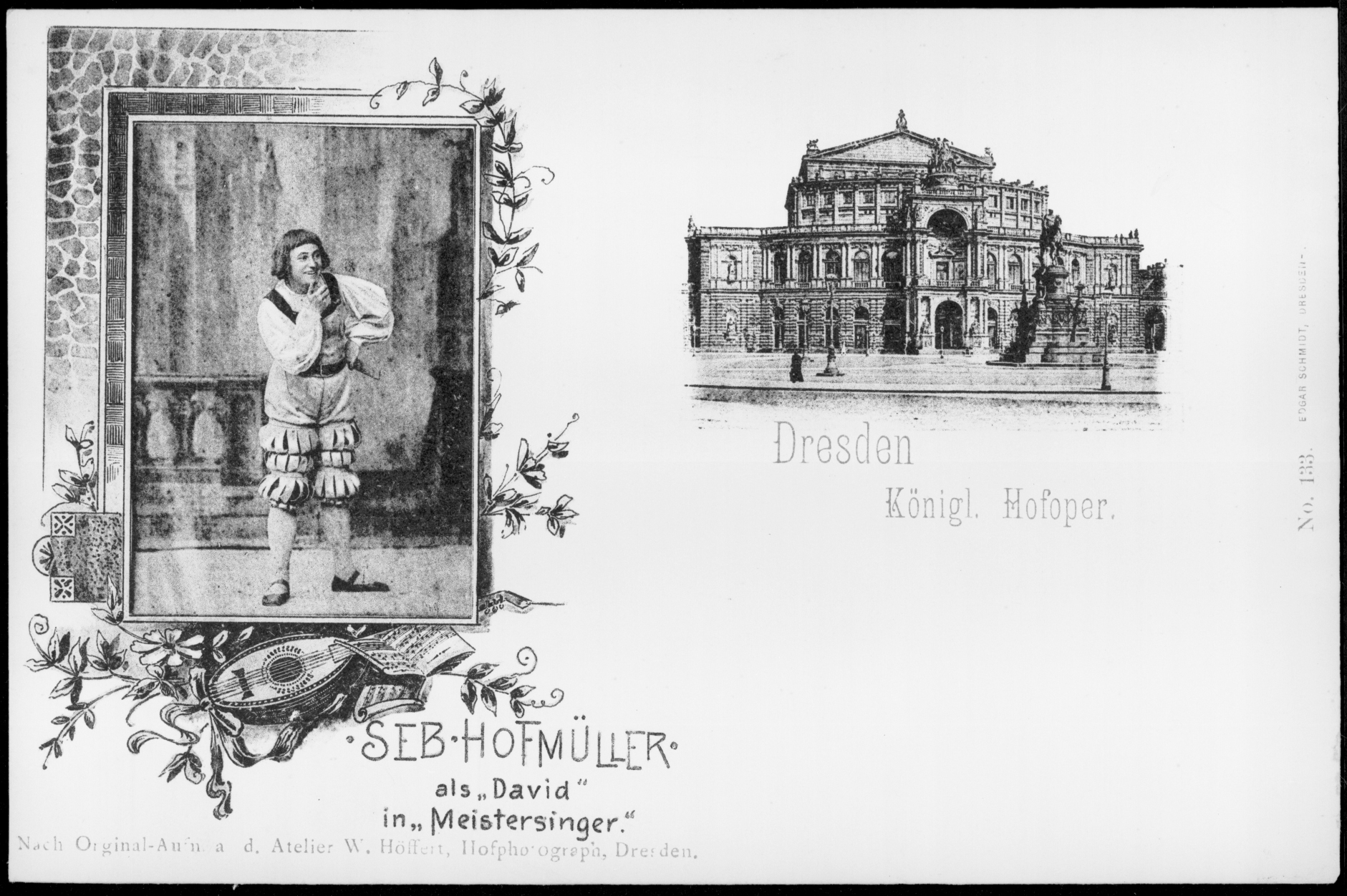 Sebastian Hofmüller als David, Rollenbild, in: Richard Wagner: Die Meistersinger von Nürnberg - Königl. Hofoper, Dresden. Foto von W. Höffert; Datum vor 1900 (Aufenthalt Hofmüllers in Dresden 1890-1900)